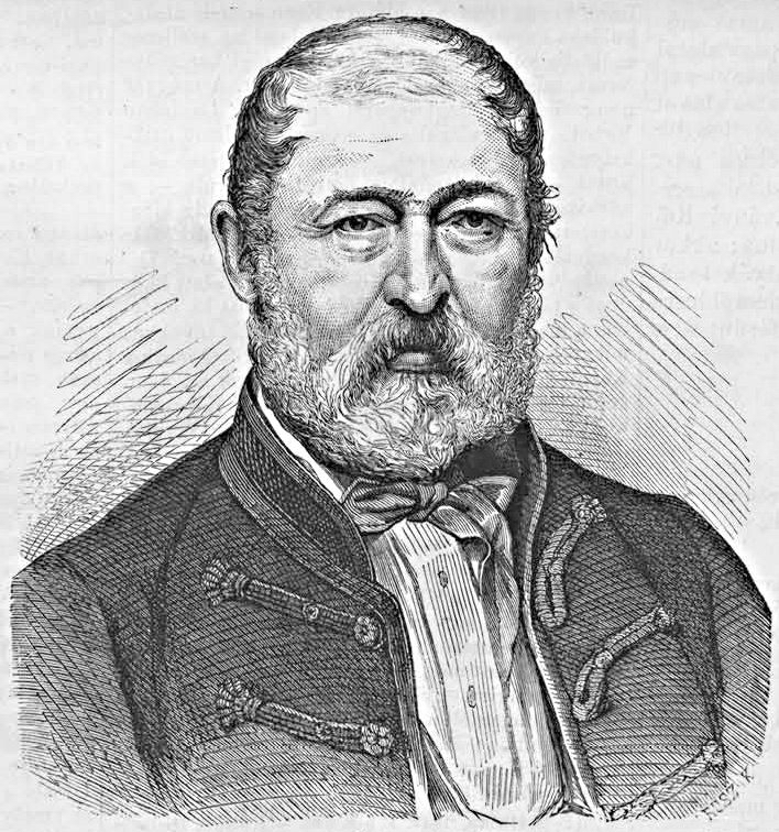 Szentiványi Károly (1802–1877) politikus, országgyűlési képviselő, kormánybiztos. Rusz Károly metszete (Vasárnapi Ujság, 1865. december 3.)